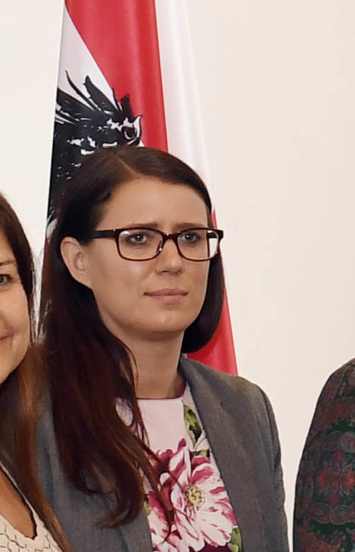 Wien am 16. Mai 2019, LandesintegrationsreferentInnenkonferenz (LIRK) Foto: Mahmoud